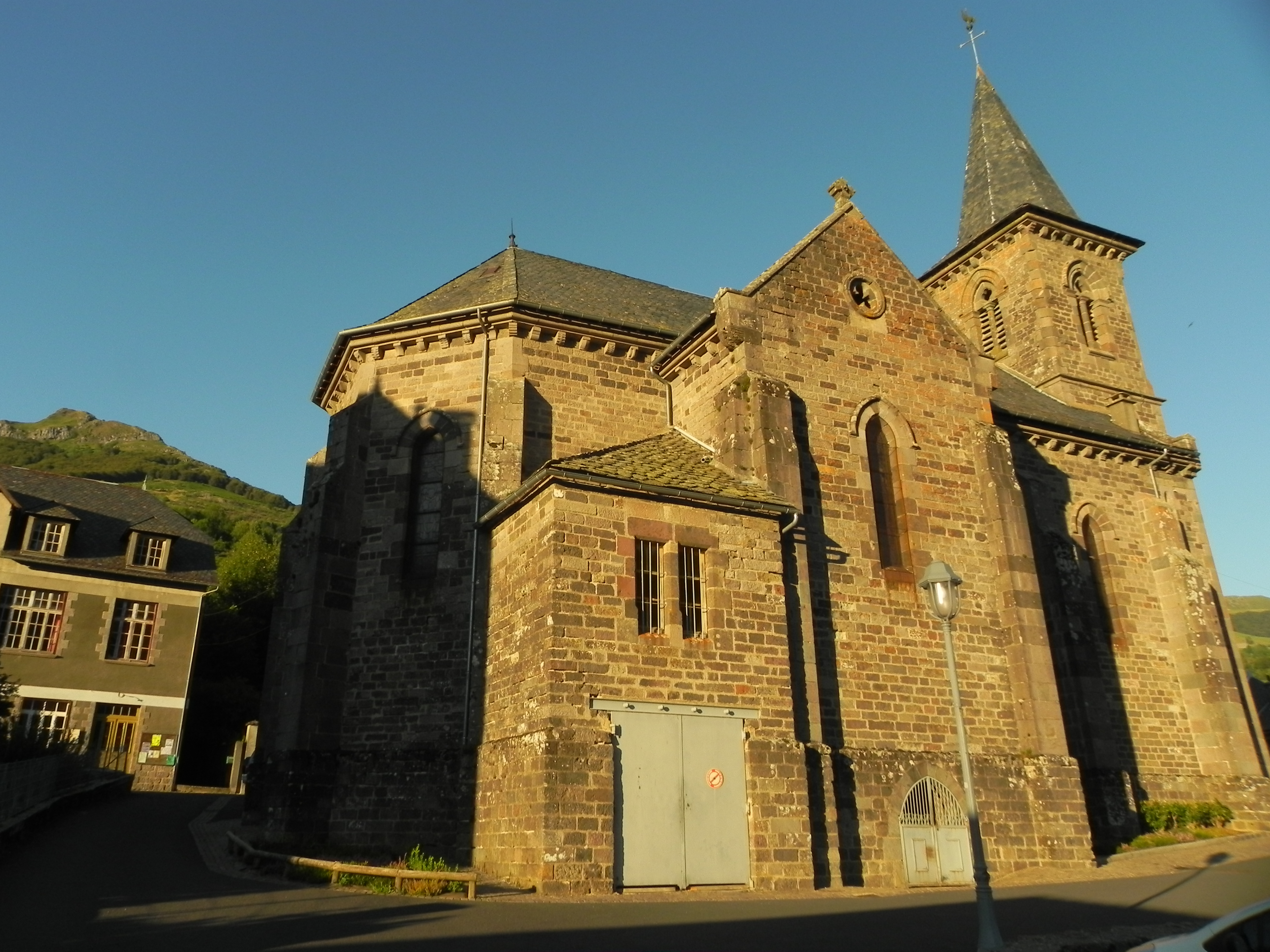 Le Falgoux est situé au pied du Puy-Mary, au cœur du parc des volcans d'Auvergne, dans le département du Cantal.